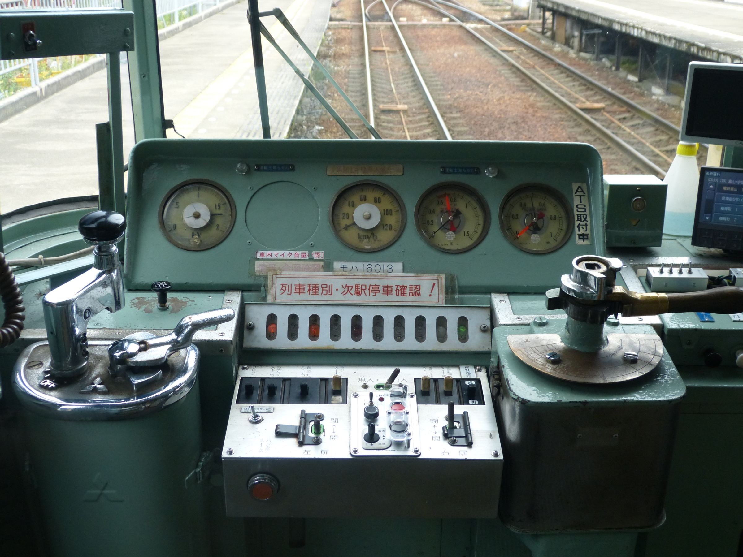 富山地方鉄道16010形運転台